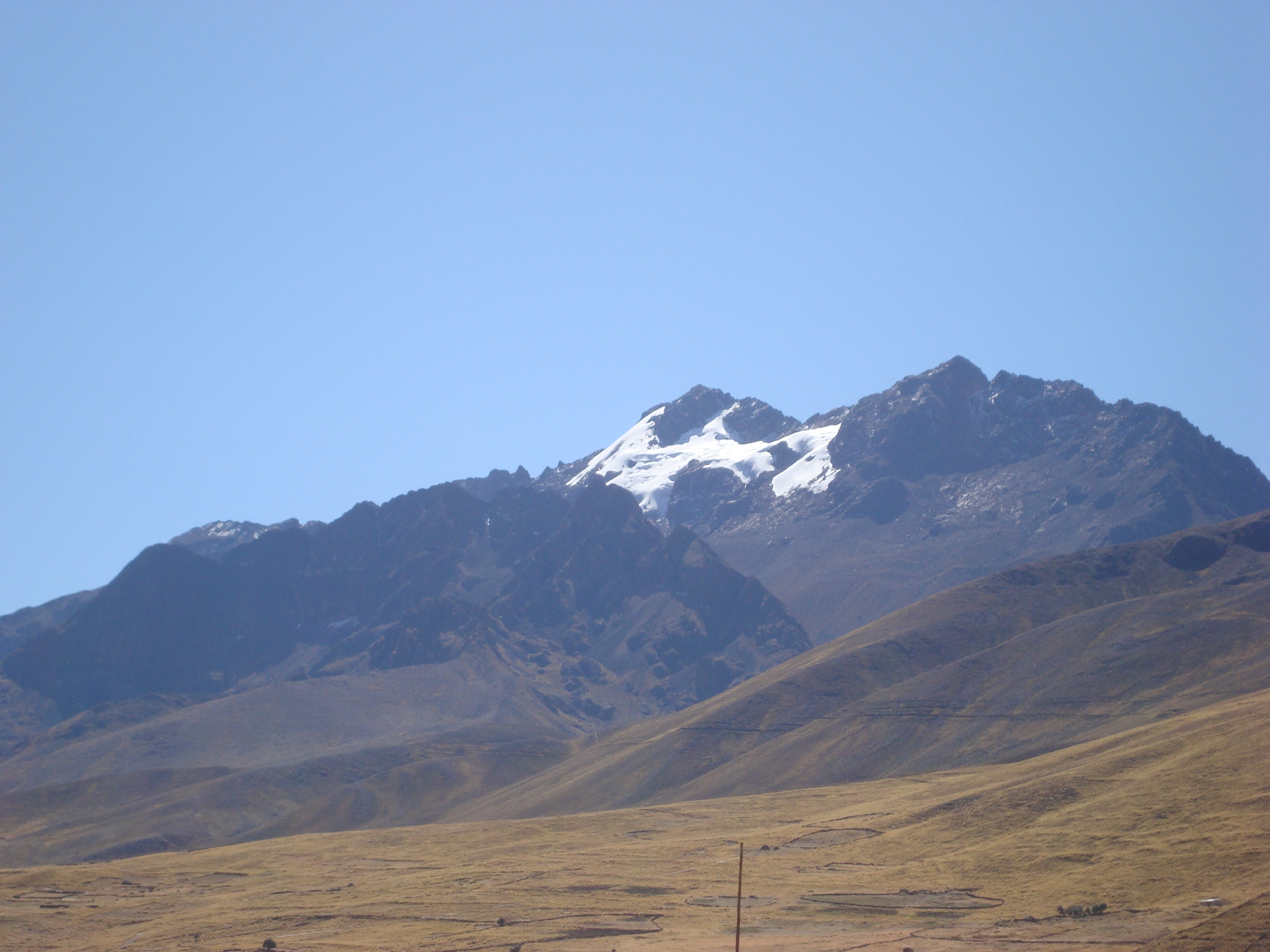 BUENO ES EN AGRADECIMIENTO A ESE HERMOSO PUEBLO DE GRANDES COSTUMBRES